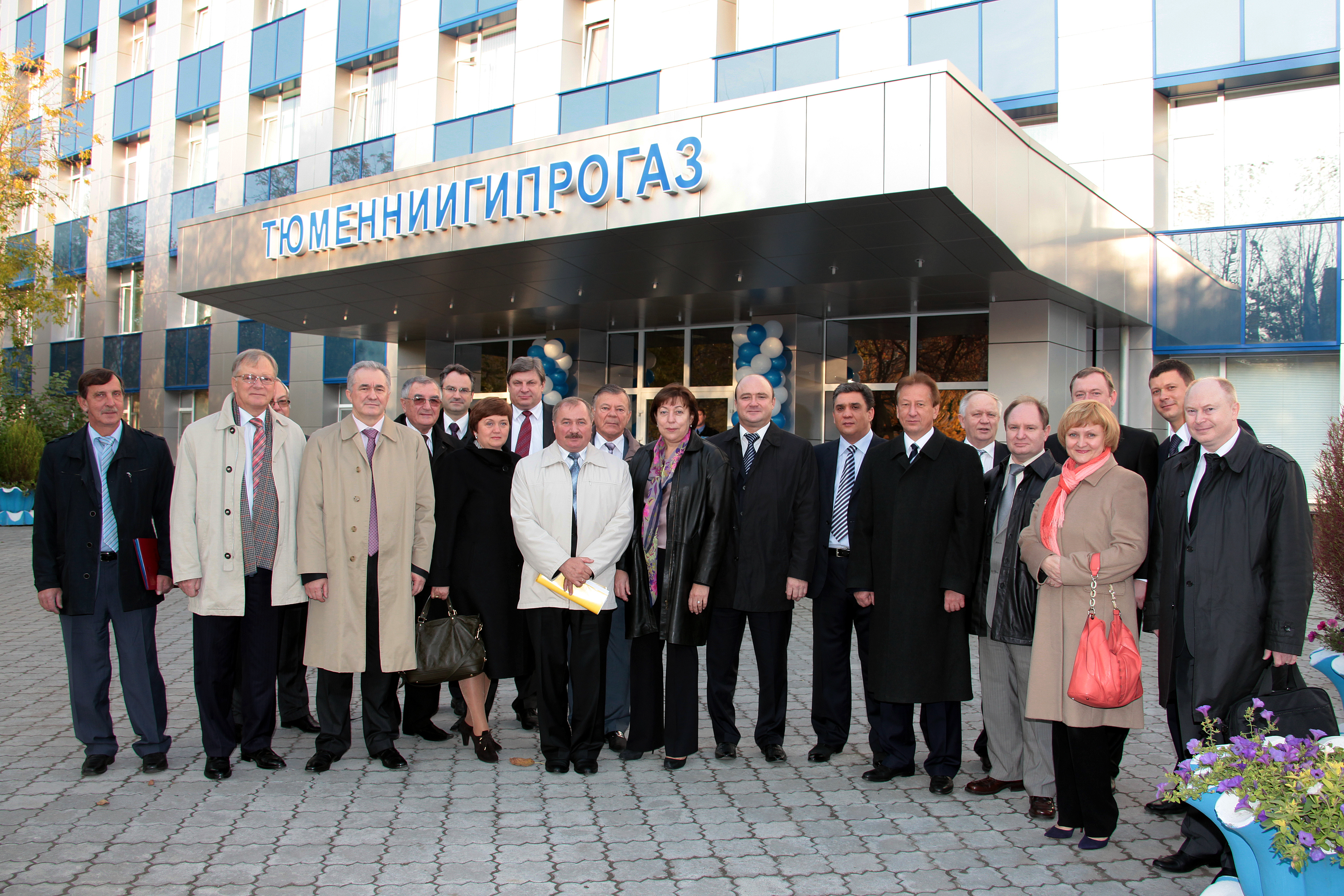 Участники научно-практической конференции «Опыт и проблемы комплексного освоения месторождений Западной и Восточной Сибири», посвящённой 45-летию со дня образования ООО «ТюменНИИгипрогаз». г. Тюмень. 10-12 октября 2011 г.